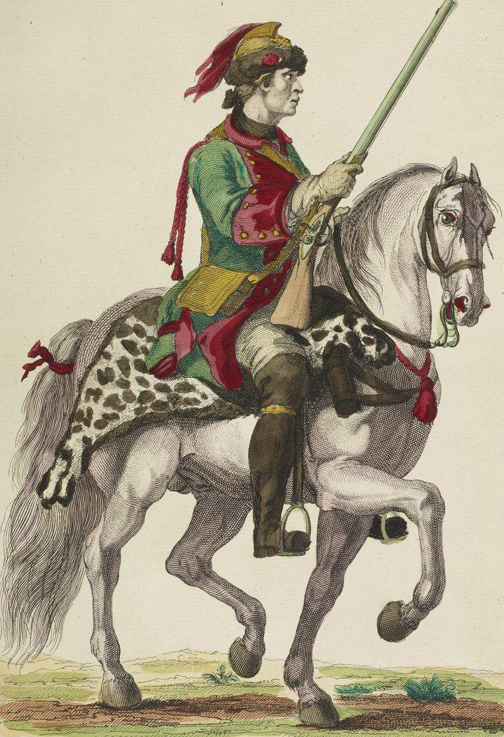 Volontaires de Saxe, Dragon